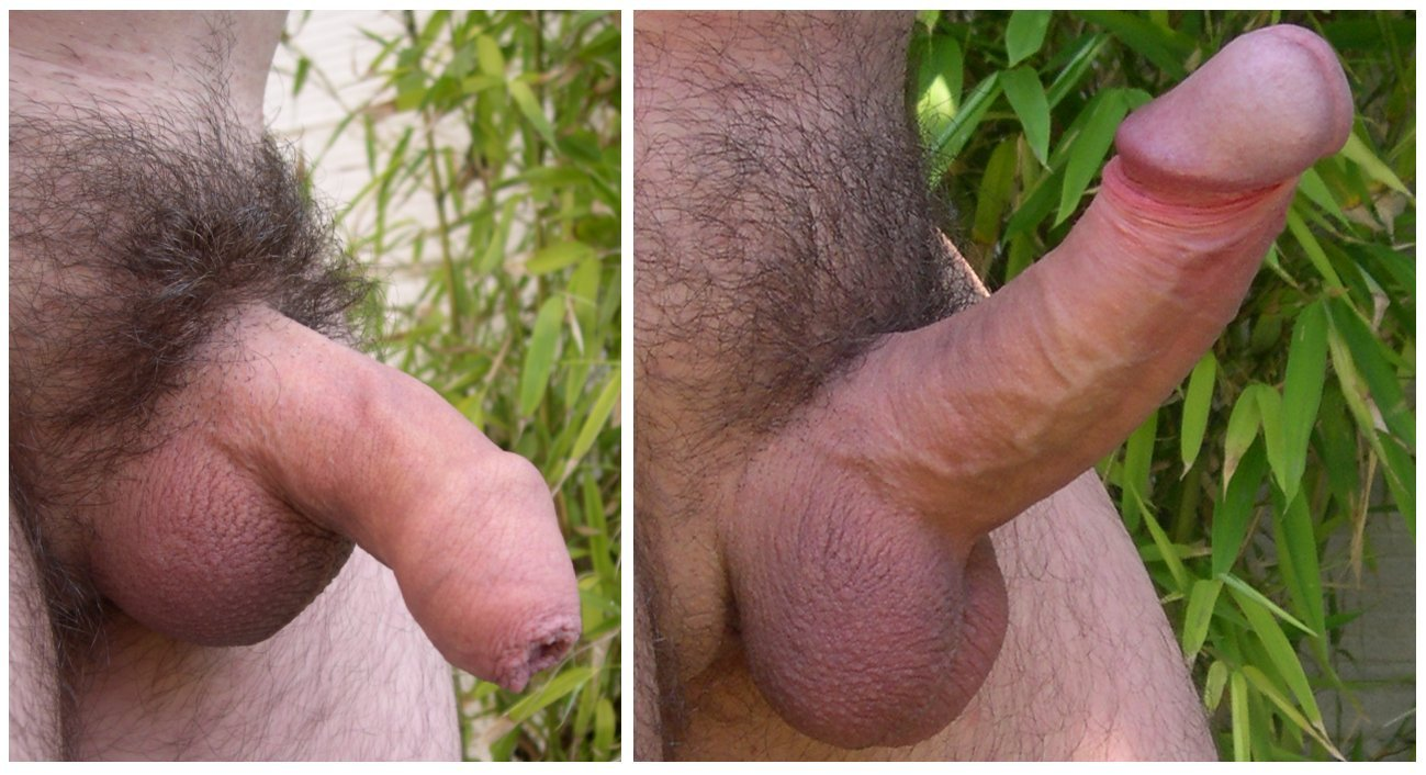 Menschlicher Penis im schlaffen und erigierten Zustand.